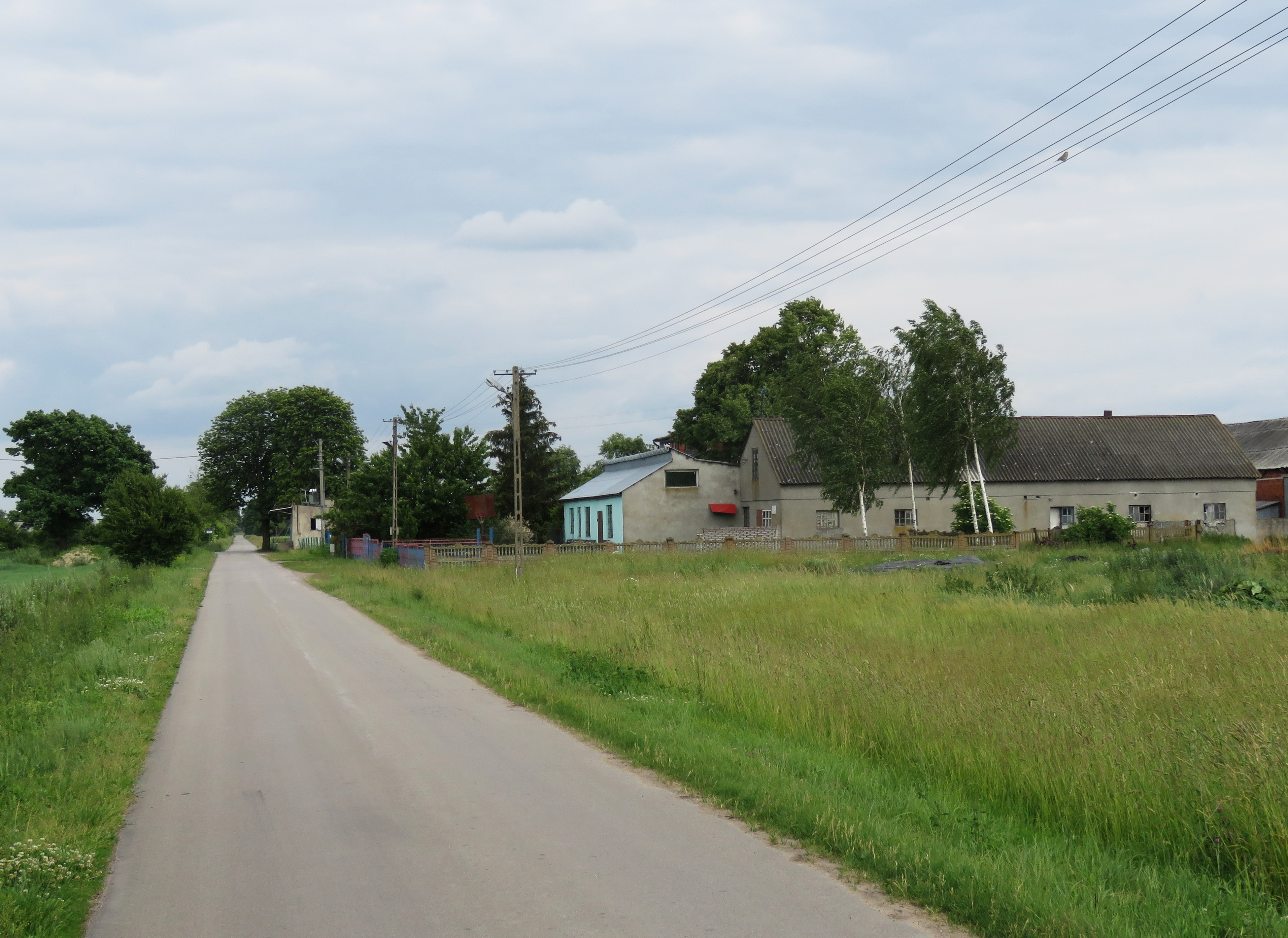 Roztropna